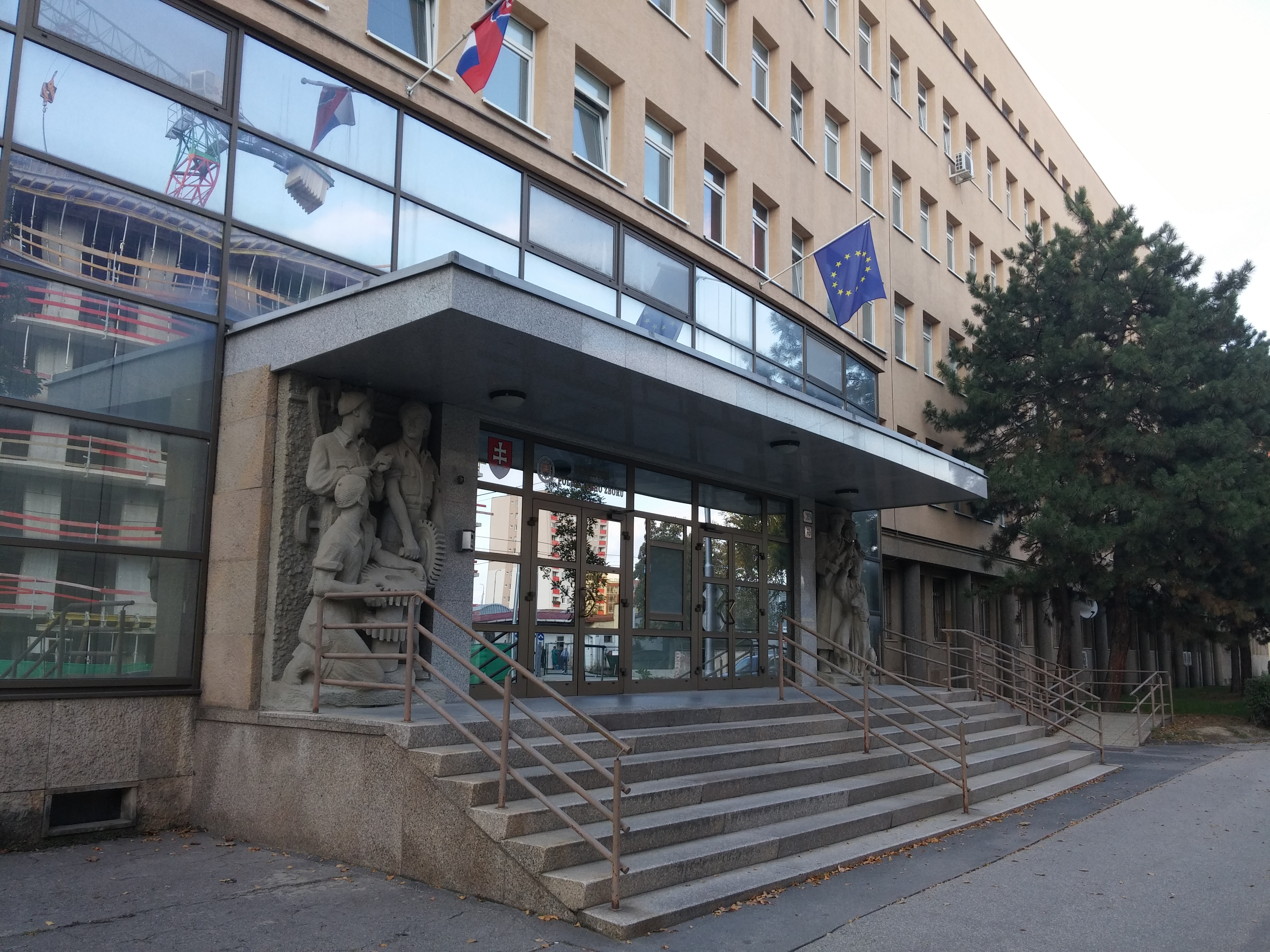 Račianska 45, Nové Mesto, Bratislava